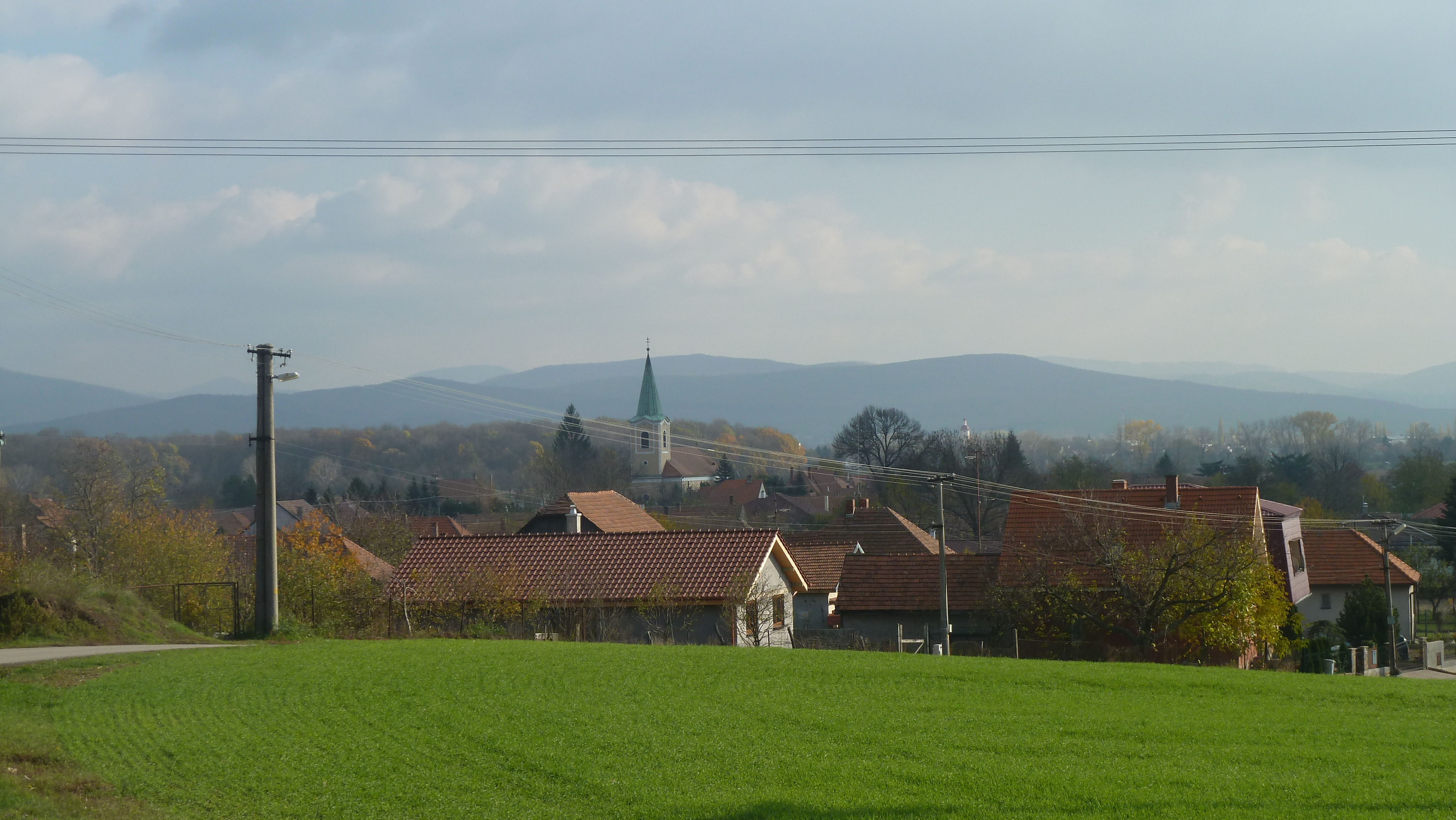 Obec Nadlice